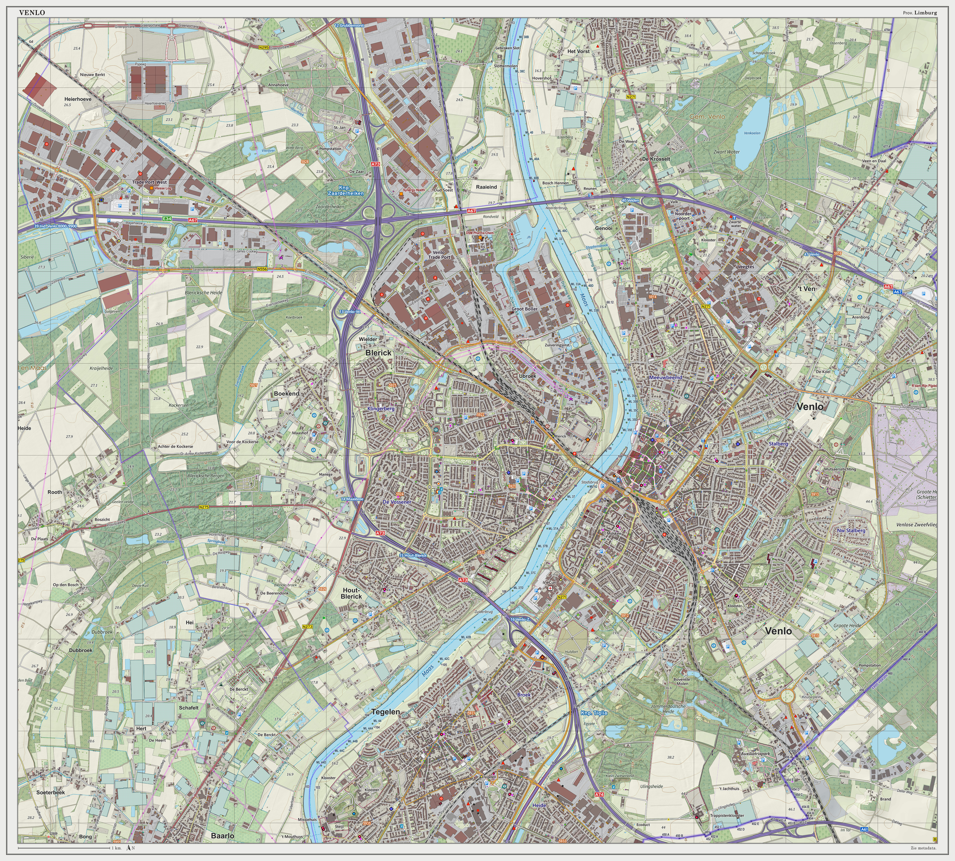 Topografische kaart van Venlo (woonplaats). Resolutie: 300 pixels/km. Kaartbeeld samengesteld uit de open geodata van de Top10NL en Top25namen (Basisregistratie Topografie, Kadaster), Creative Commons BY licentie. Gebouwvlakken uit open geodata BAG extract. Wegen uit de OpenStreetMap. Reliëfschaduw uit de Actuele Hoogtekaart AHN2. Samenstelling en kleurenschema: Jan-Willem van Aalst, met QGIS2. Zie ook de Legenda.